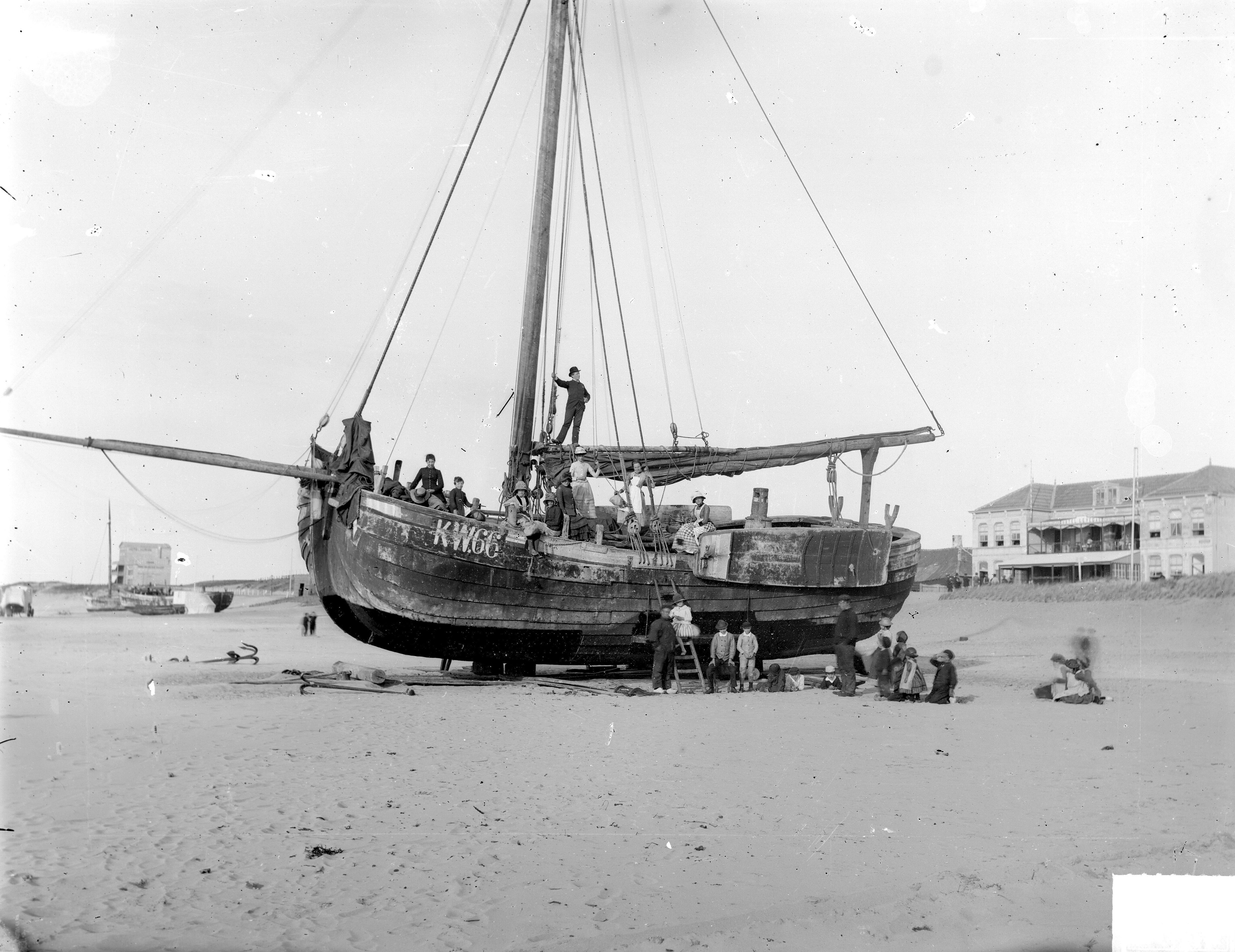 Gezicht op het strand van Katwijk aan Zee, met bomschuit KW66. Op het schip staan mensen, op de achtergrond een hotel.